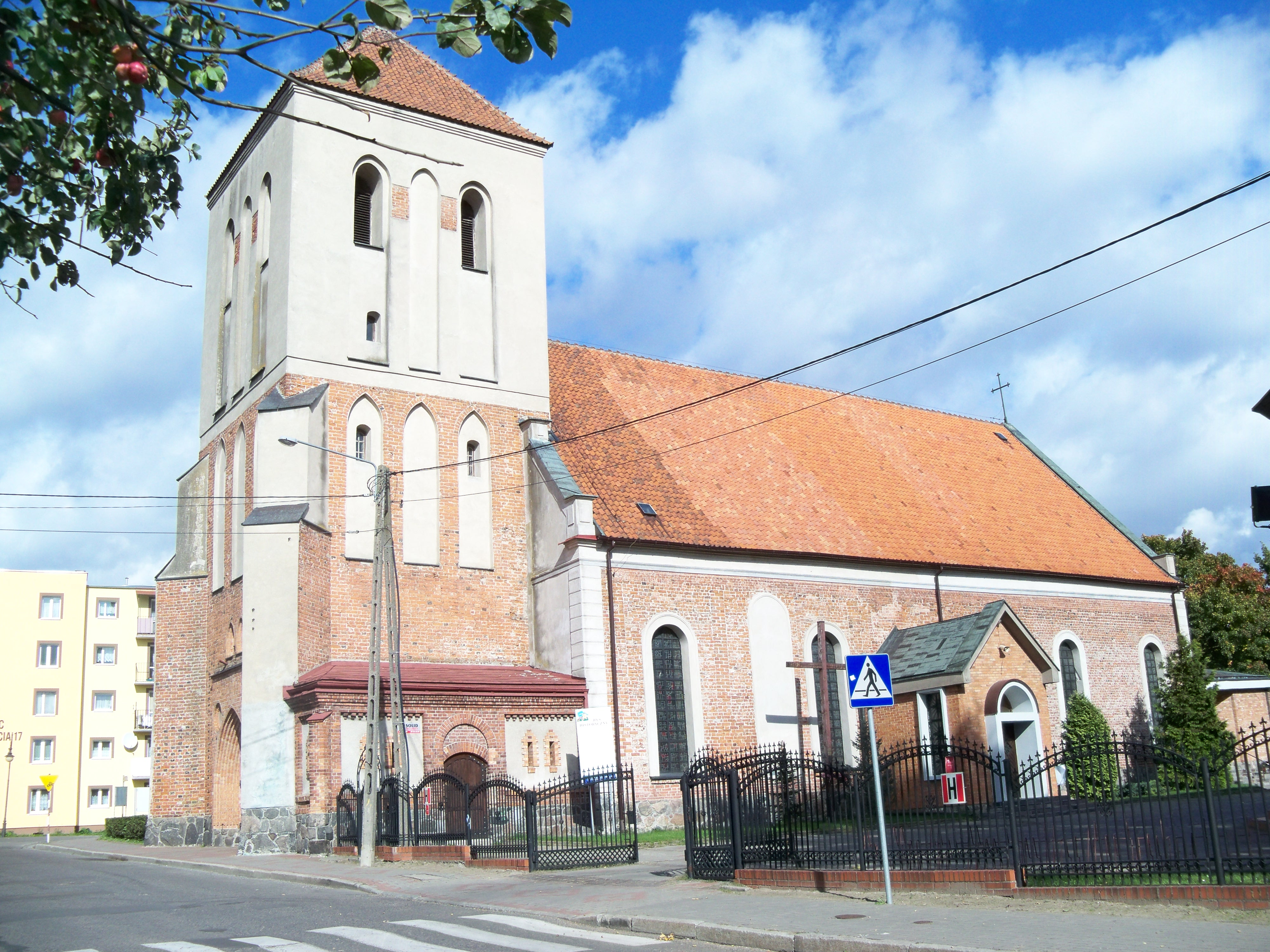 Ostróda, plac Tysiąclecia Państwa Polskiego - rzymskokatolicki kościół parafialny p.w. św. Dominika Savio, 1330-1351, odbud. 1985 (dec. ruina)